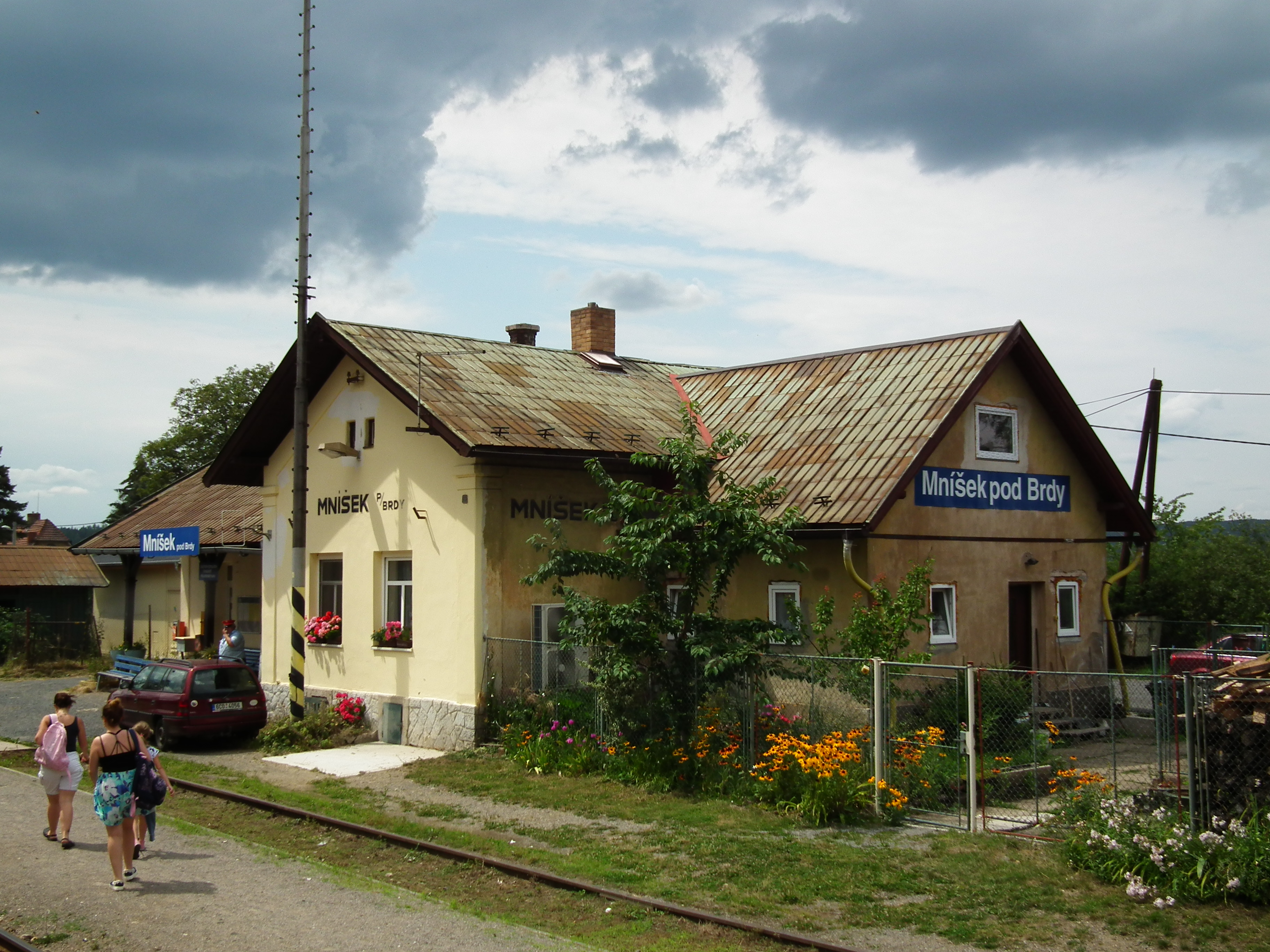 Mnisek pod Brdy train station.